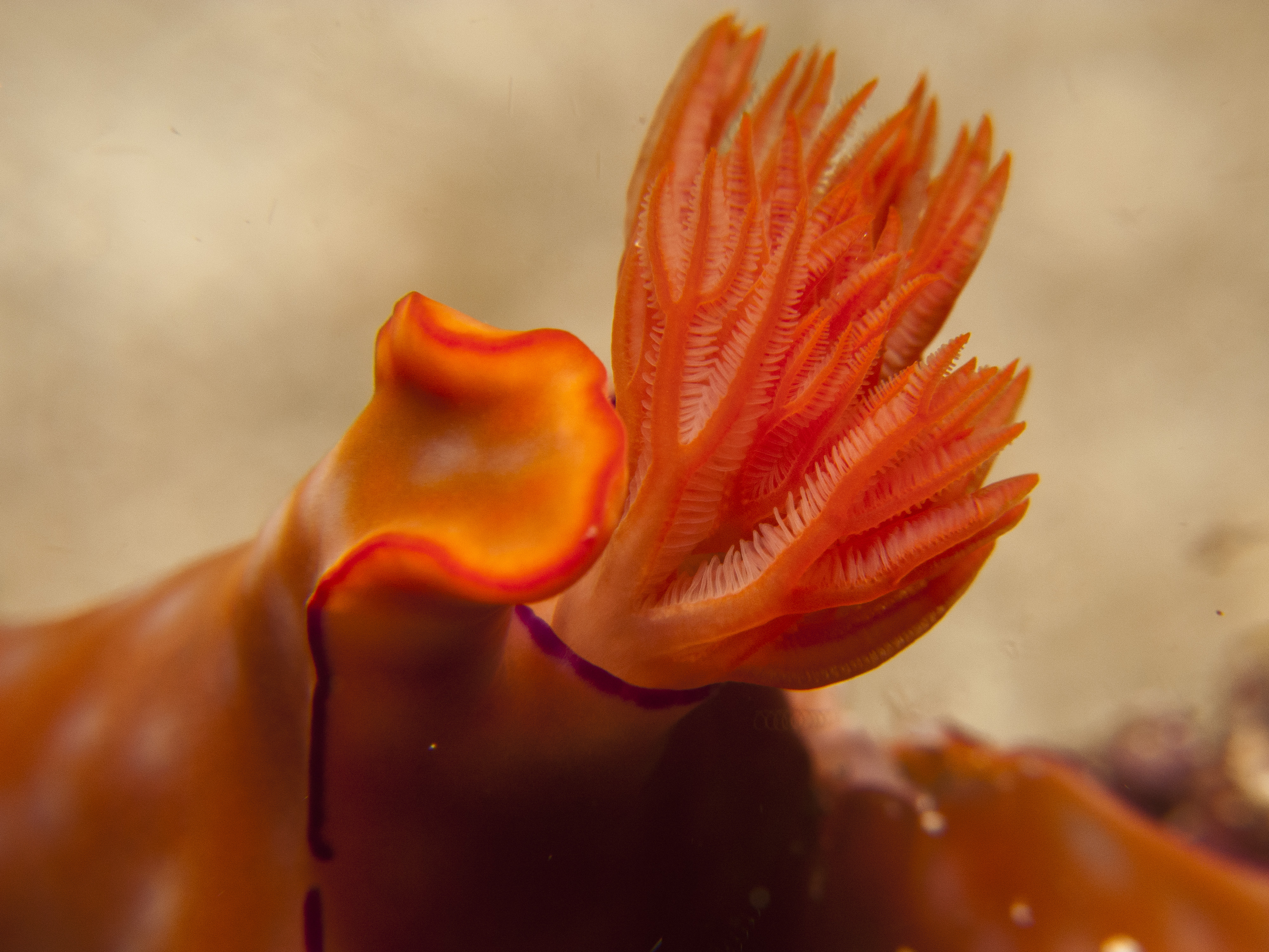 Ceratosoma trilobatum, branquias. Isla Alor, Nusatenggara Oriental, Indonesia